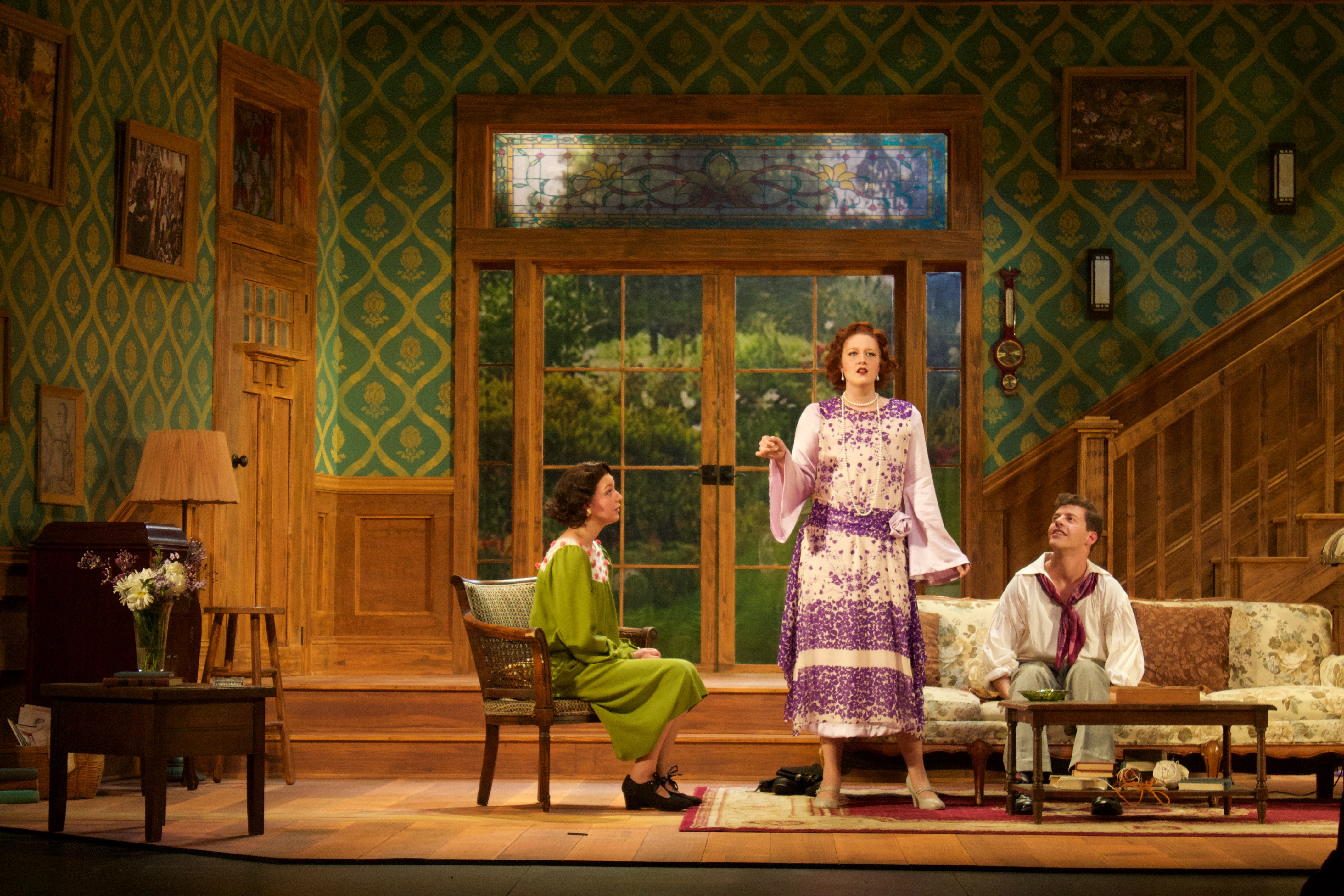 Hayfever